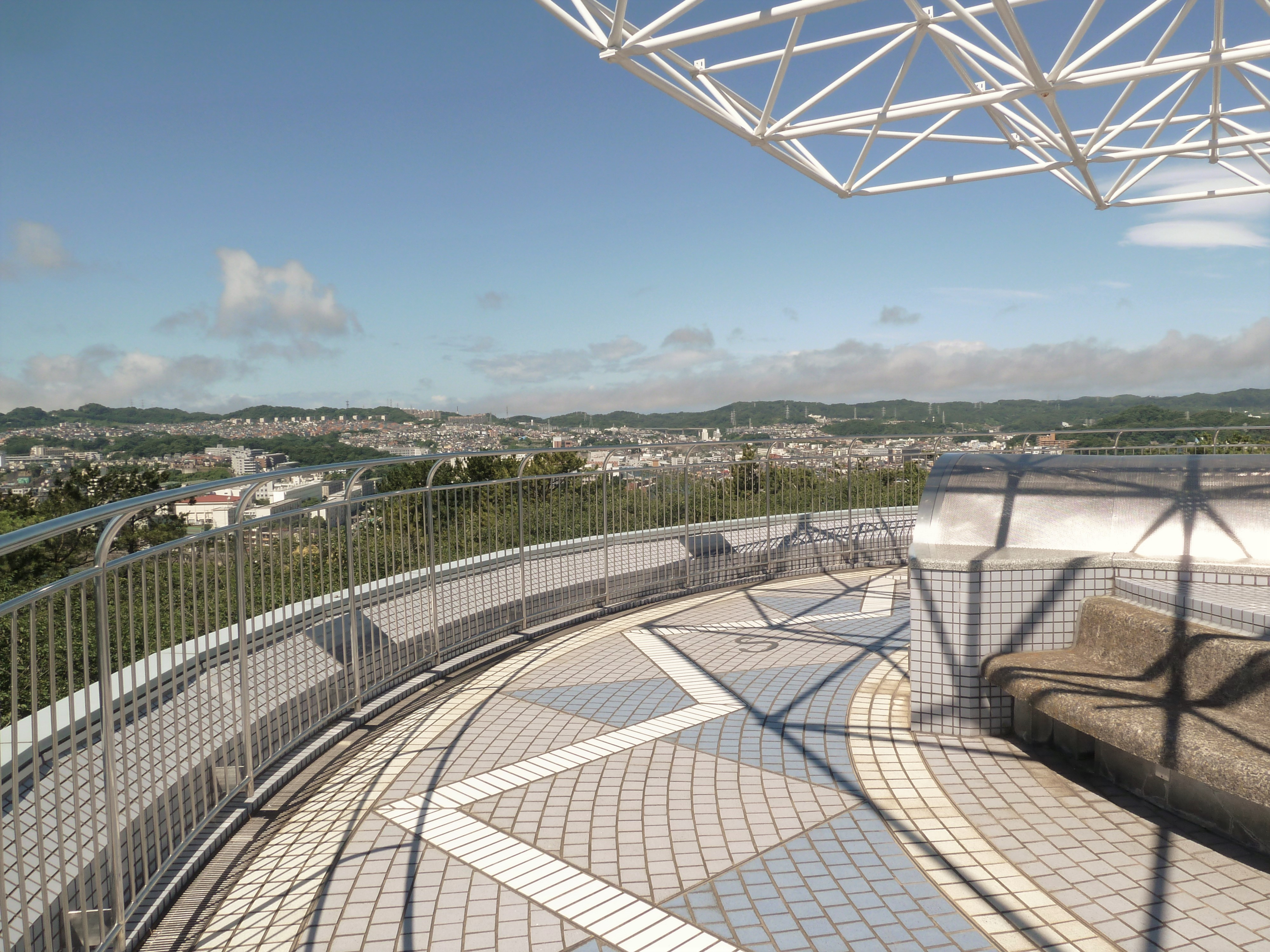 野島公園展望台(神奈川県横浜市金沢区)